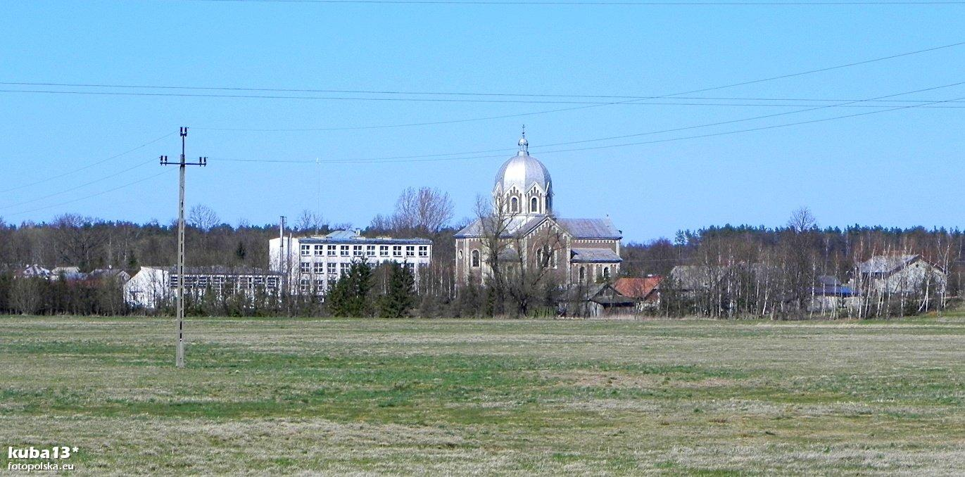 Widok na Nowy Lubliniec z górującą nad nim dawną cerkwią.